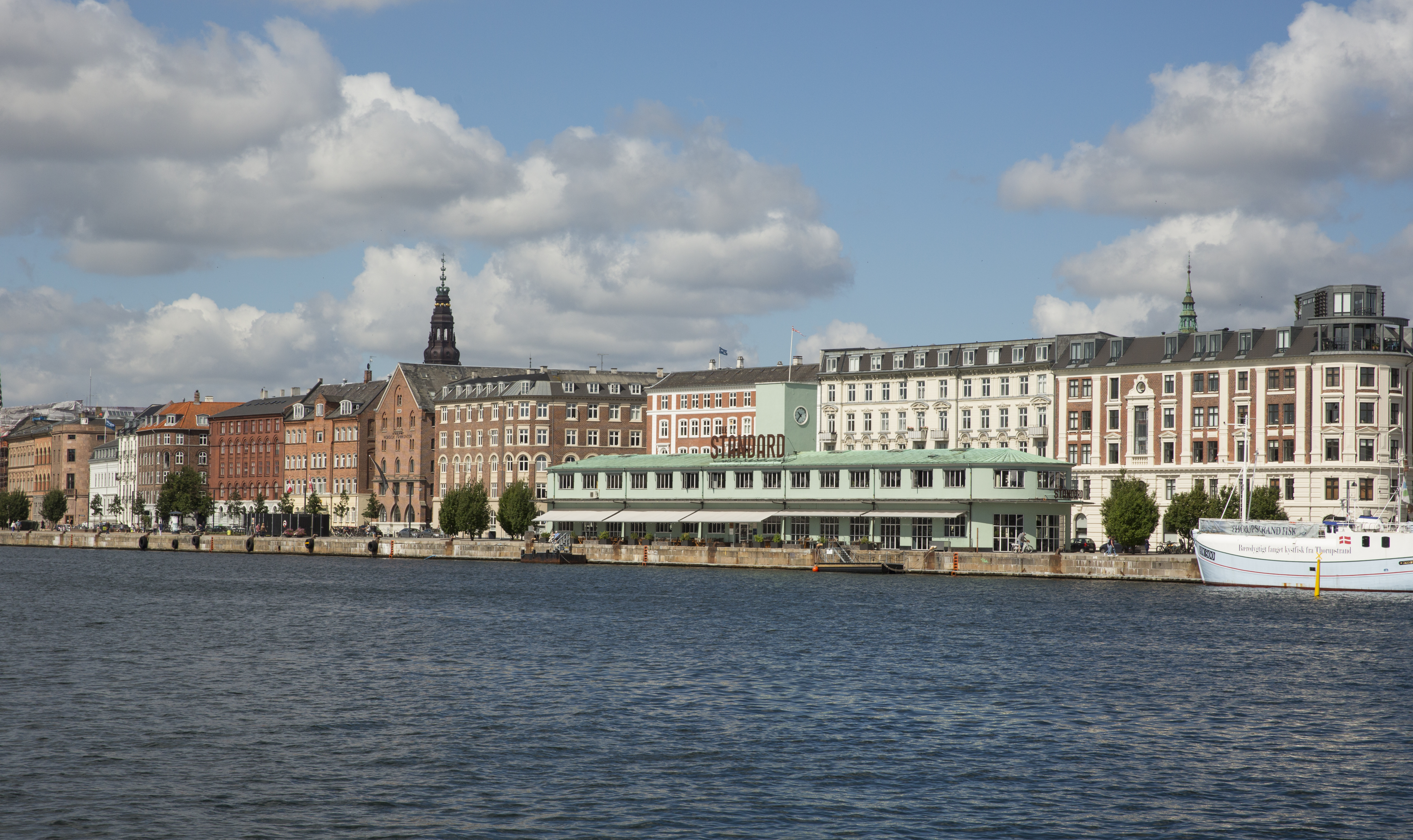 The Standard i Köpenhamn, tidigare biljettkassa och vänthall för flygbåtarna till Sverige och numera jazzklubb. Photo: News Øresund - Jenny Andersson. © News Øresund - Jenny Andersson (CC BY 3.0). Detta verk av News Øresund är licensierat under en Creative Commons Erkännande 3.0 Unported-licens (CC BY 3.0). Bilden får fritt publiceras under förutsättning att källa anges. The picture can be used freely under the prerequisite that the source is given. News Øresund, Malmö, Sweden. News Øresund är en oberoende regional nyhetsbyrå som är en del av det oberoende dansk-svenska kunskapscentrat Øresundsinstituttet.